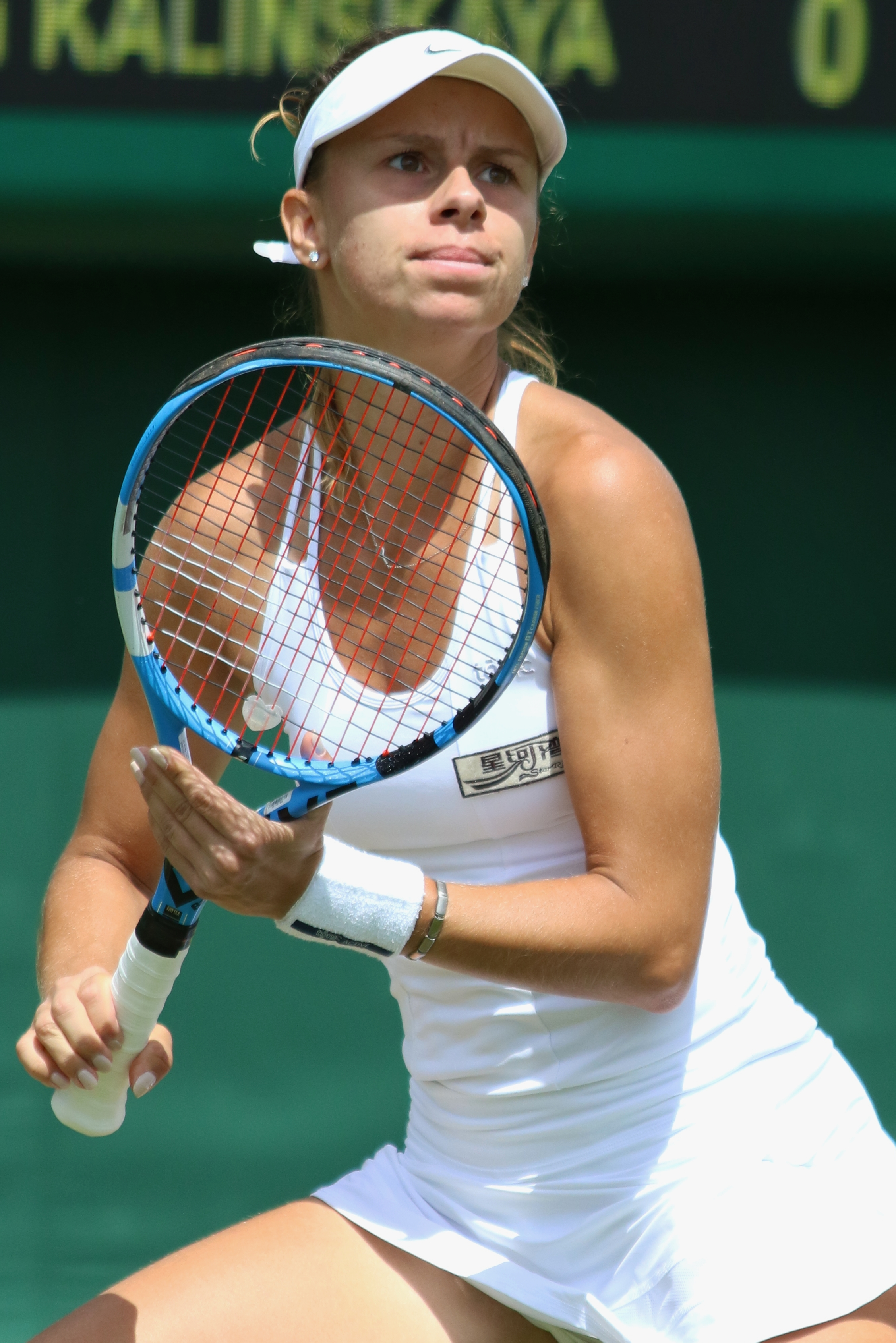 Linette WM19 (25)